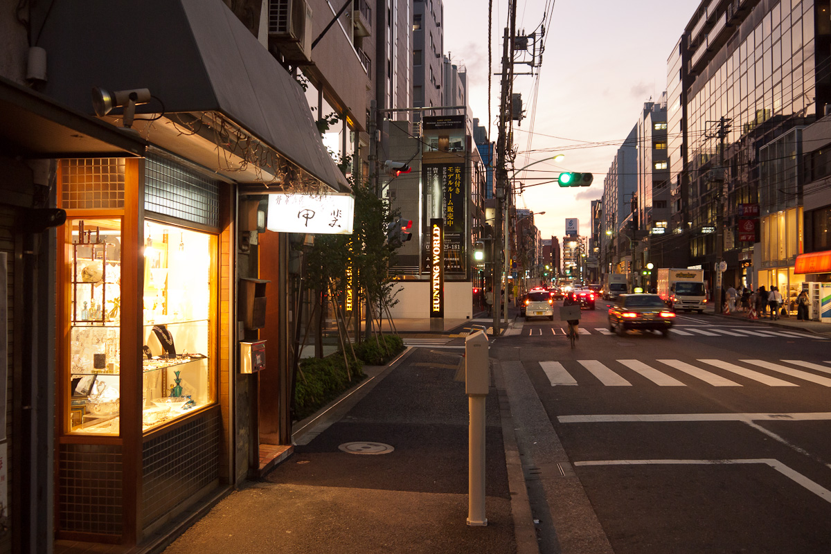 青山「骨董通り」、東京都港区南青山5丁目。